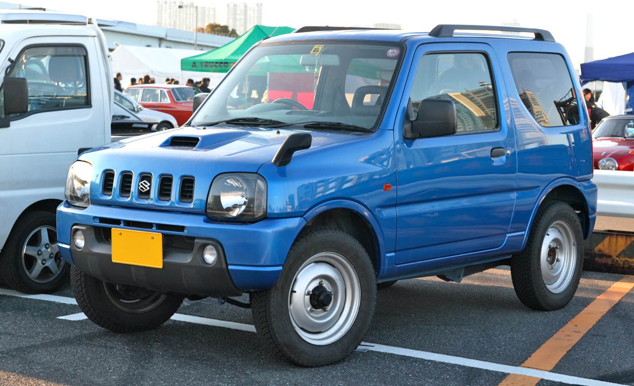 Suzuki Jimny 660 ( JB23W )